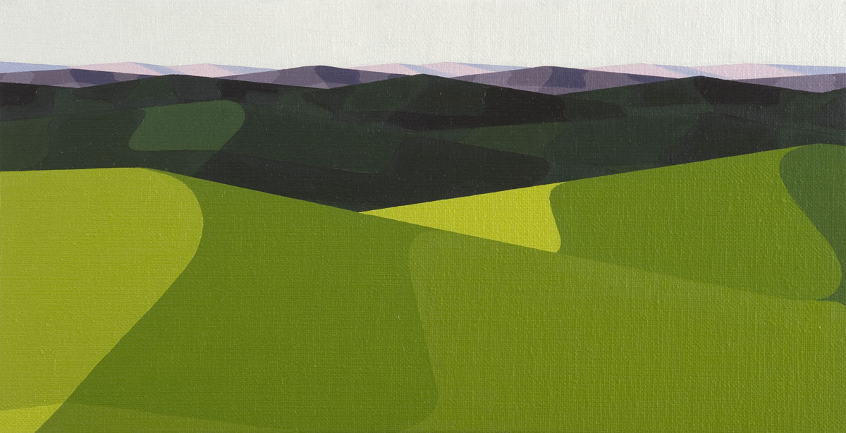 Landschaft 2009, Öl/Leinwand, 16,5 x 33cm